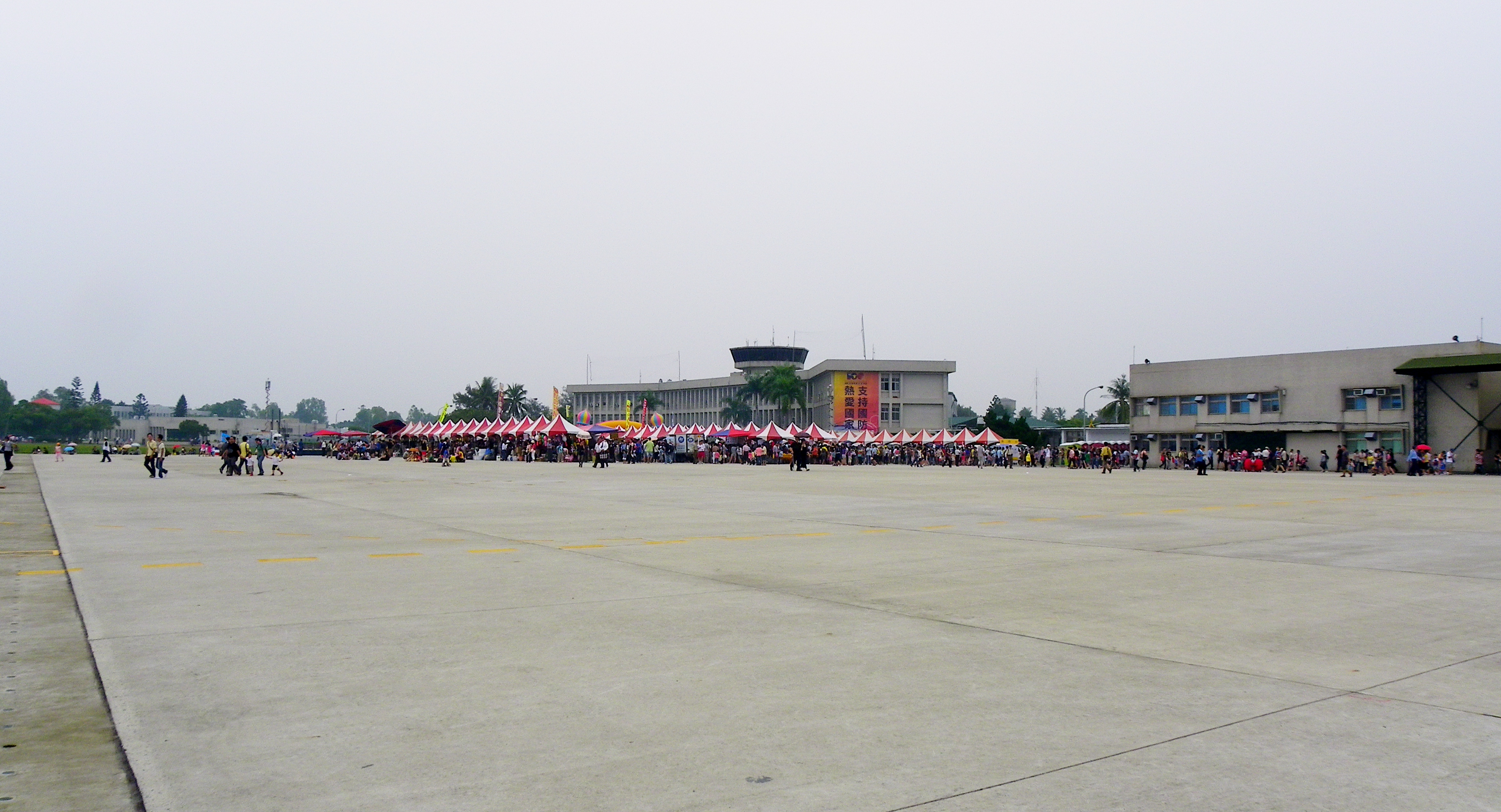 空軍岡山基地營區開放活動，東停機坪北側的餐飲攤位區，攤位後方為凌雲樓。